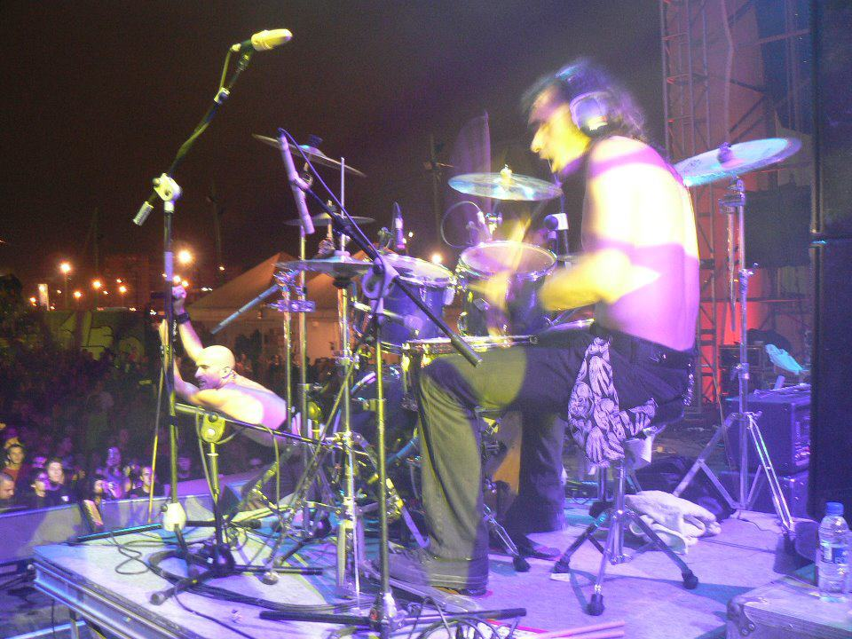 Juan A. Parra Batería.